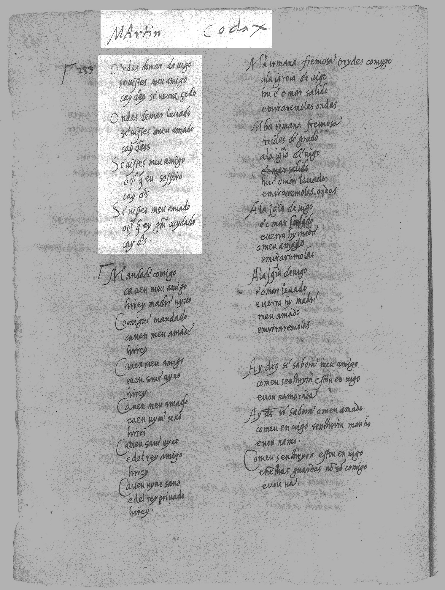 Cancioneiro da Vaticana - V 884